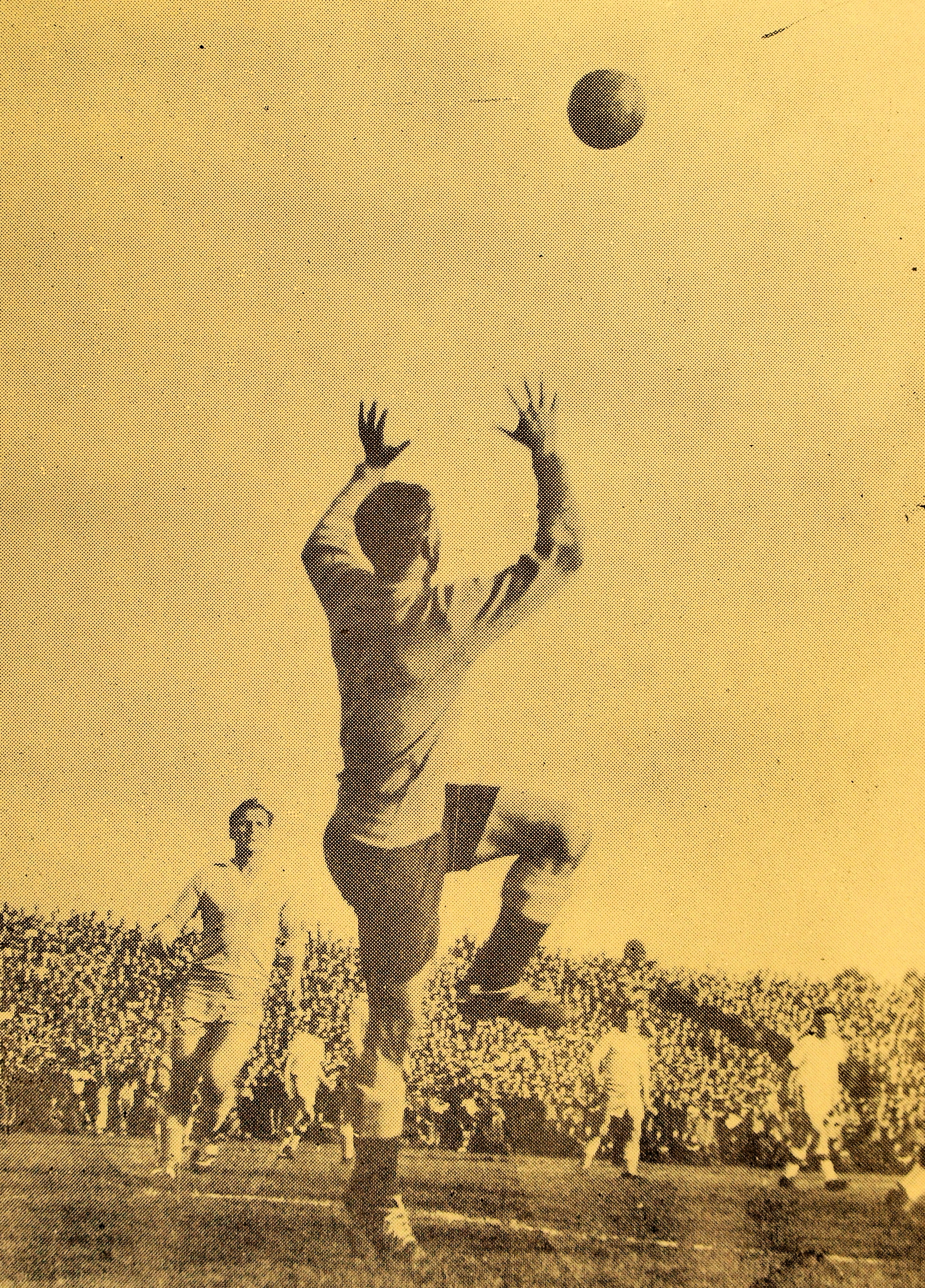 Ryszard Wyrobek - bramkarz Ruchu Chorzów